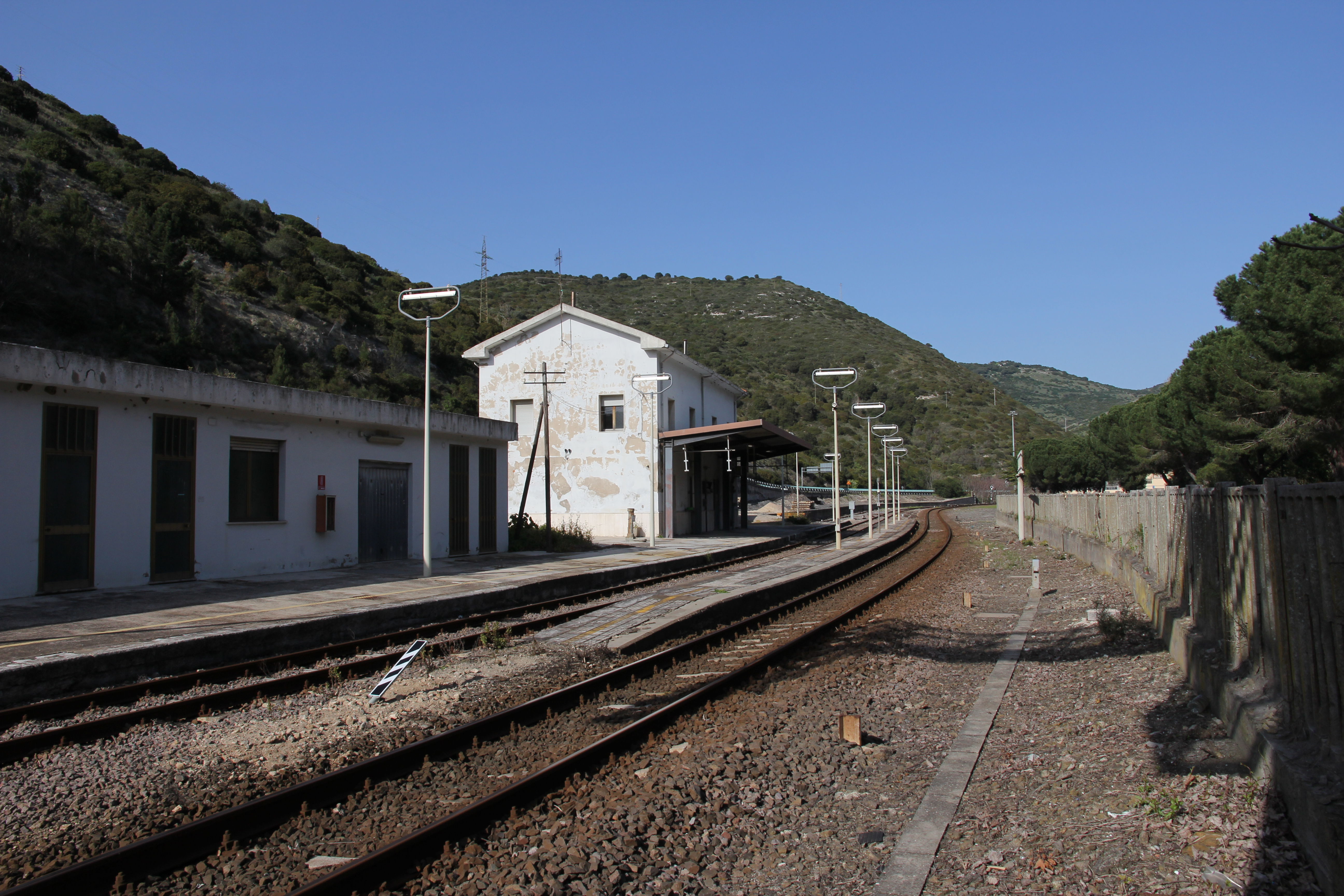 Muros - Stazione ferroviaria di Scala di Giocca